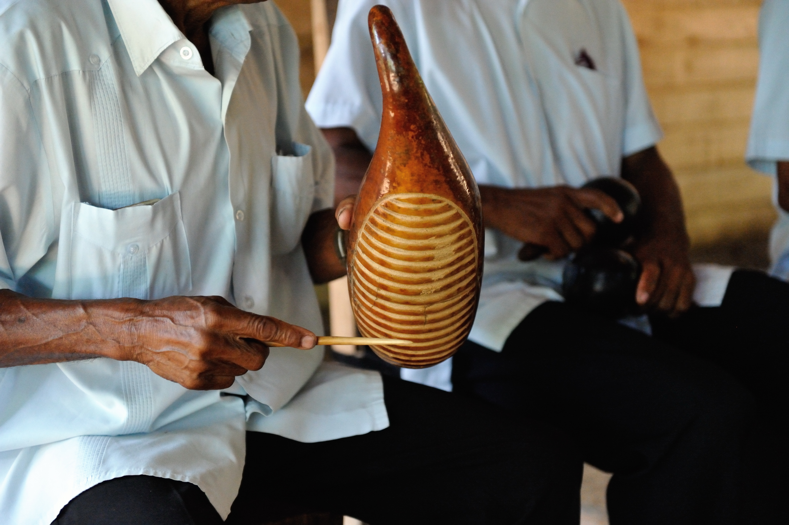 Hombre tocando un güiro, en Cuba.